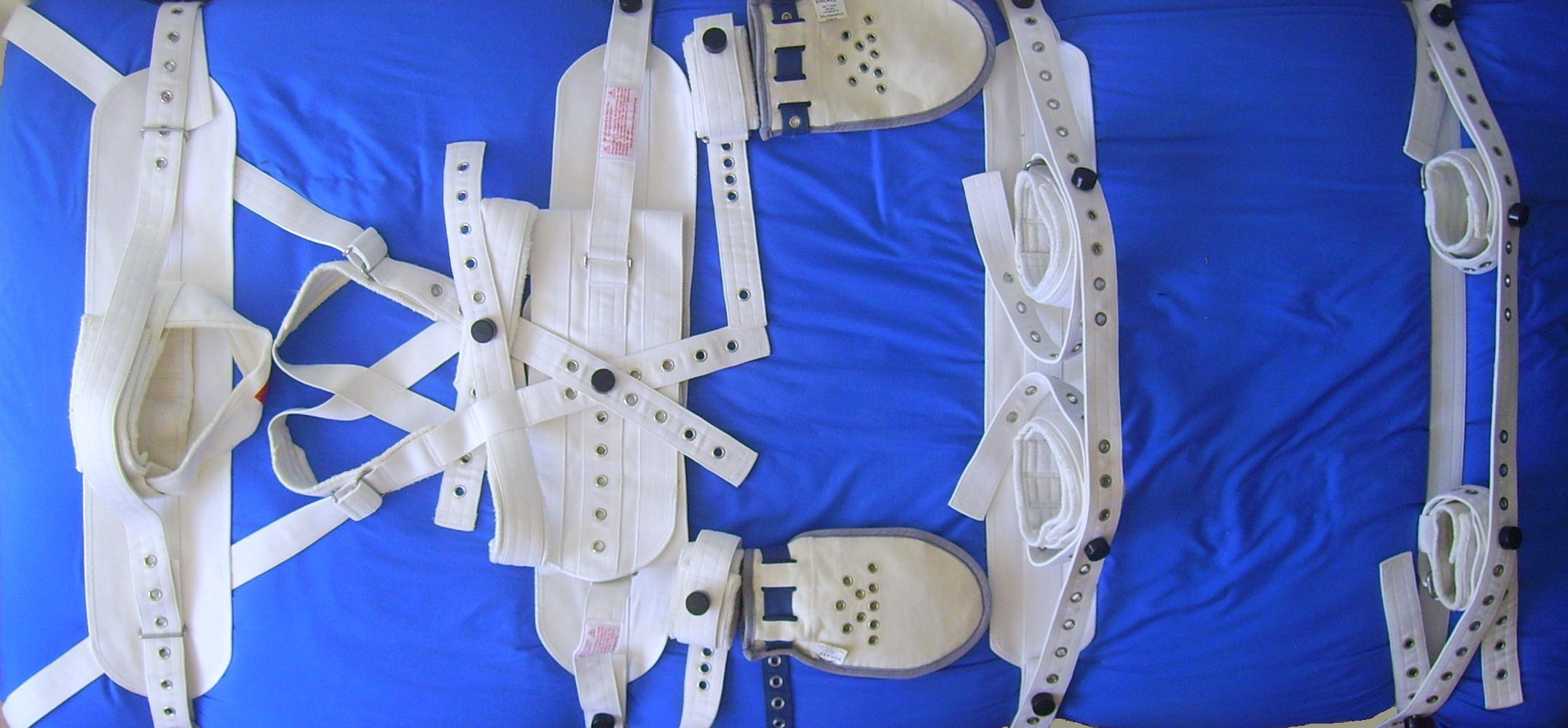 fixierung , Fixierbett , PsychKG , 5-Punkt , 9-Punkt , Hand , Fuss , Oberschenkel , Bauch , Schulter , Bügelgurte , SVV , Fessel , Psychiatrie .